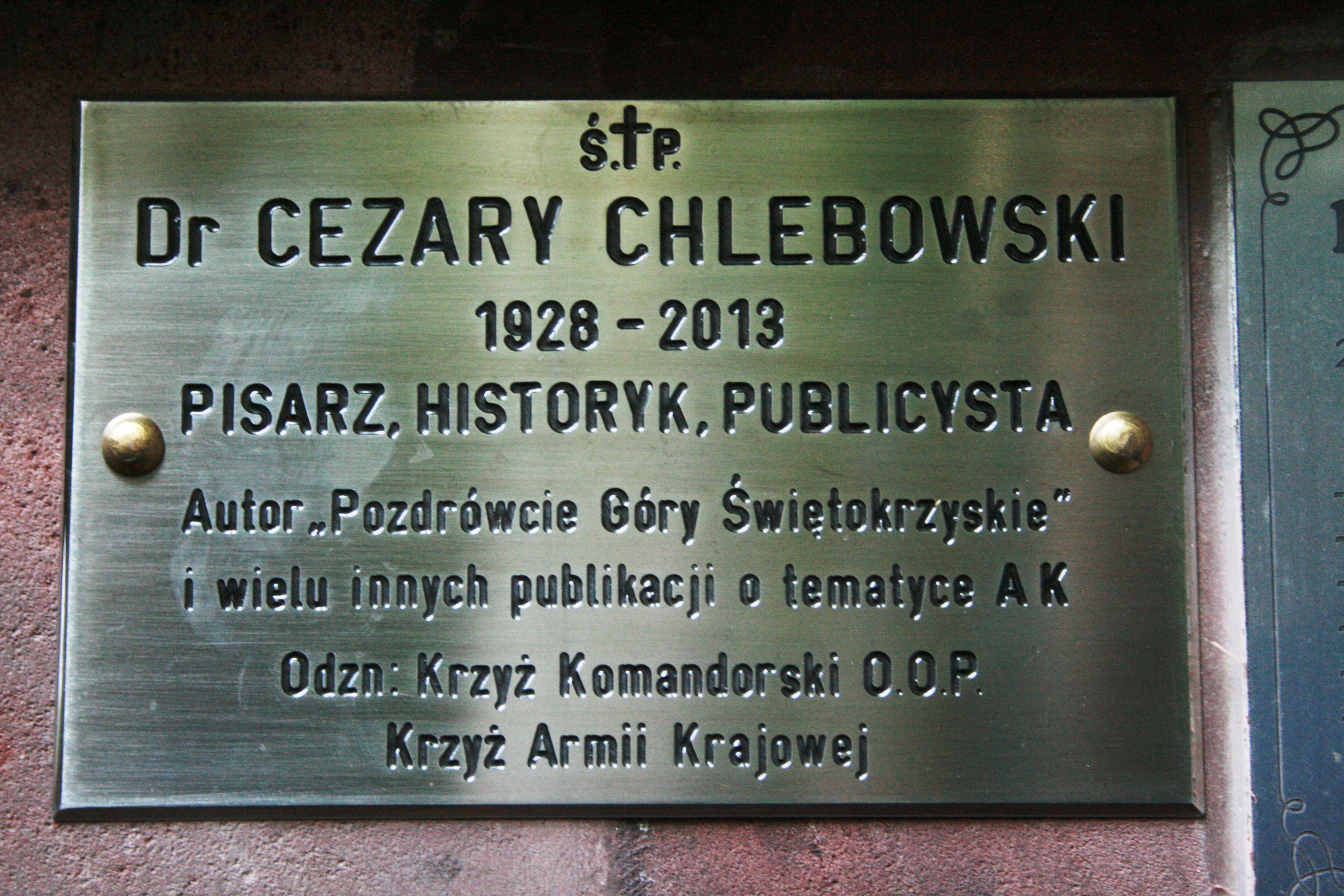 Tabliczka upamiętaniająca Cezarego Chlebowskiego umieszczona przy kaplicy na Wykusie 14 czerwca 2013 roku